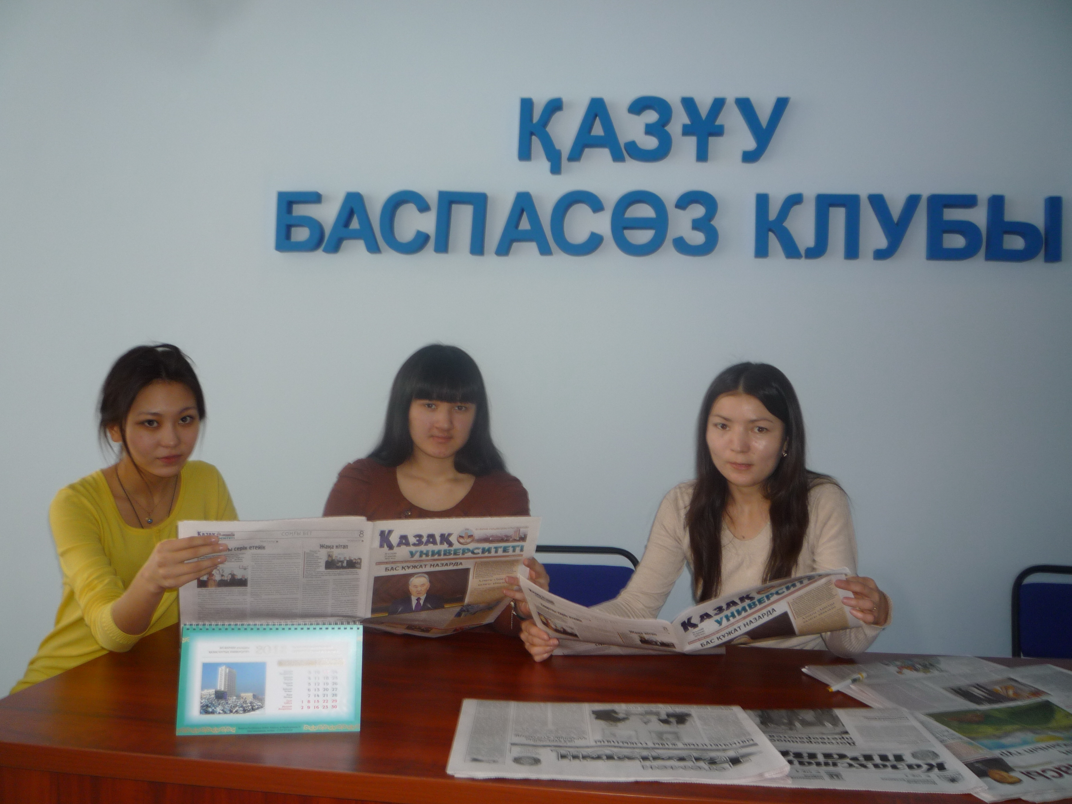 ҚазҰУ баспасөз клубы